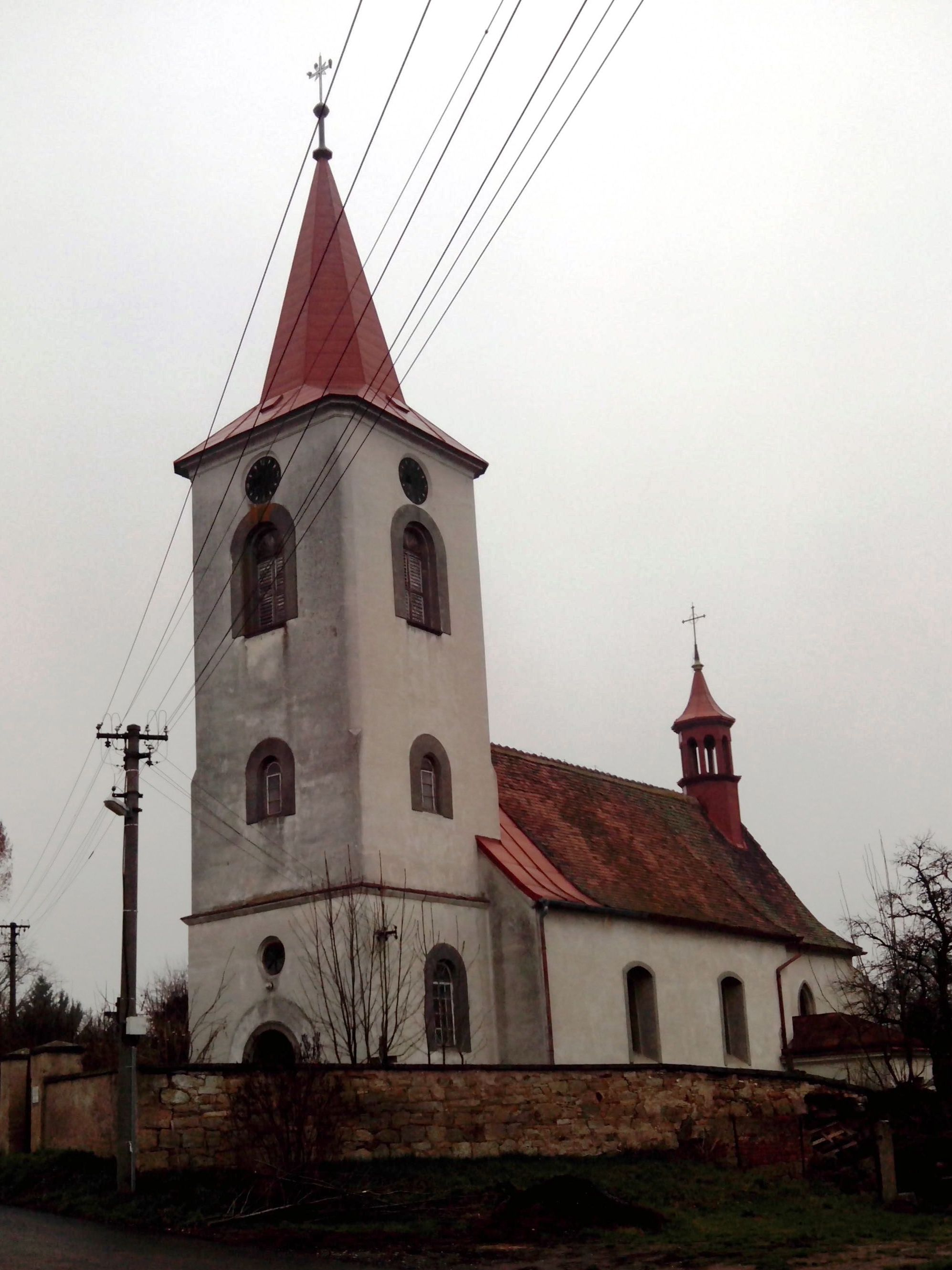 Kostel sv. Markéty v Semonicích